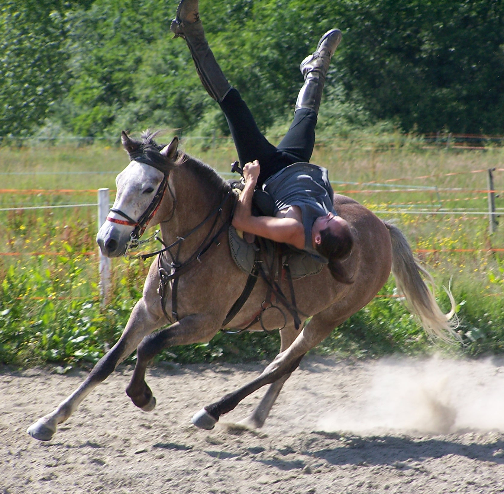 voltige cosaque , équitation